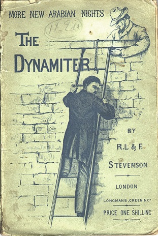 Couverture du livre "More New Arabian Nights"